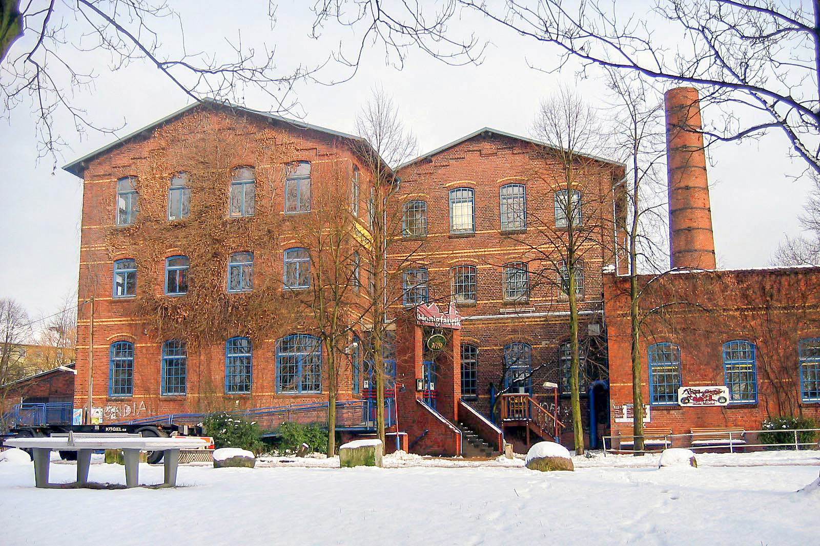 Die Honigfabrik mit Frontansicht in Hamburg Wilhelmsburg (Alt-Wilhelmsburg) im Winter 2004 This is a photograph of an architectural monument.